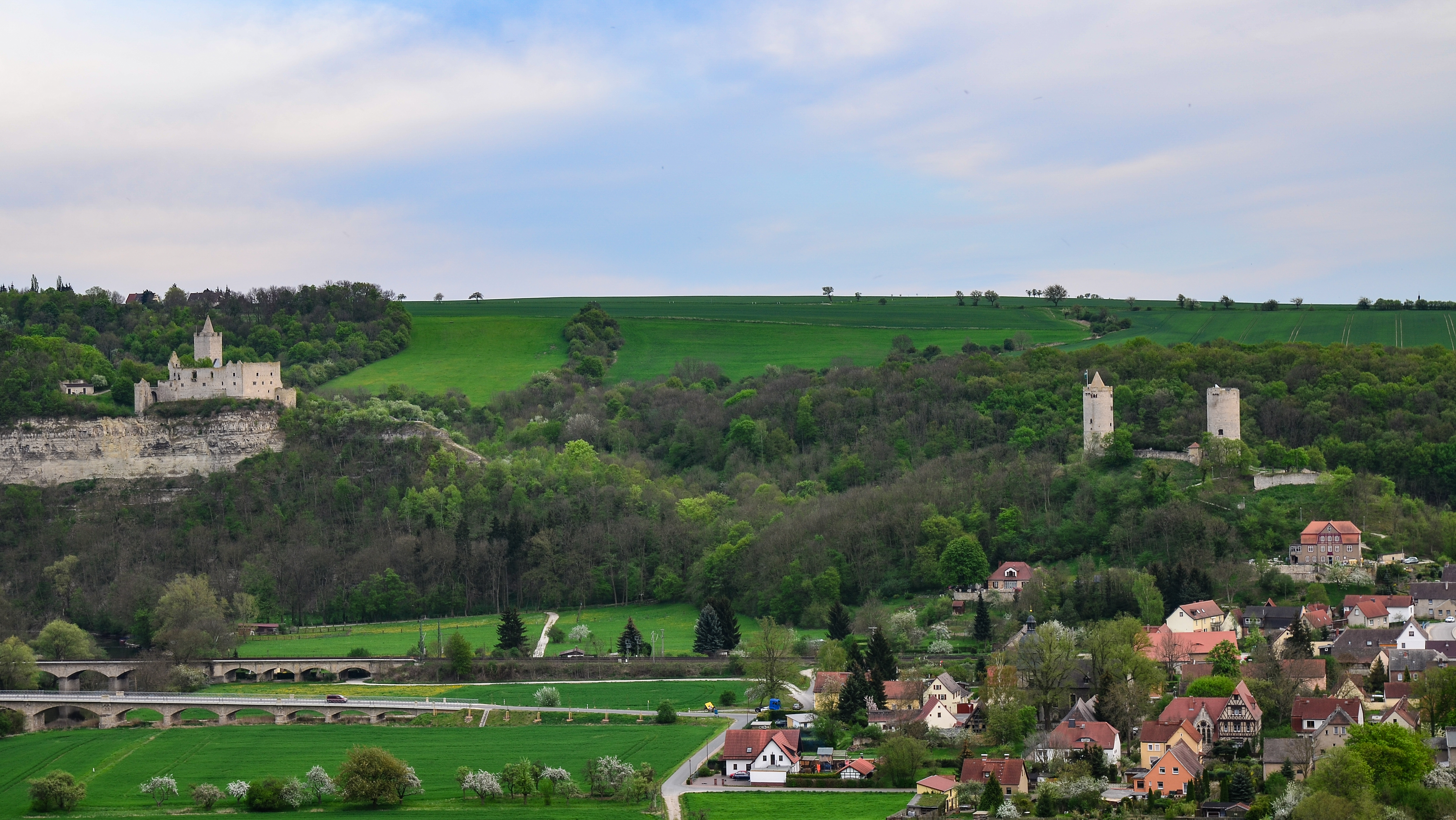 Bad Kösen Rudelsburg und Burg Saaleck